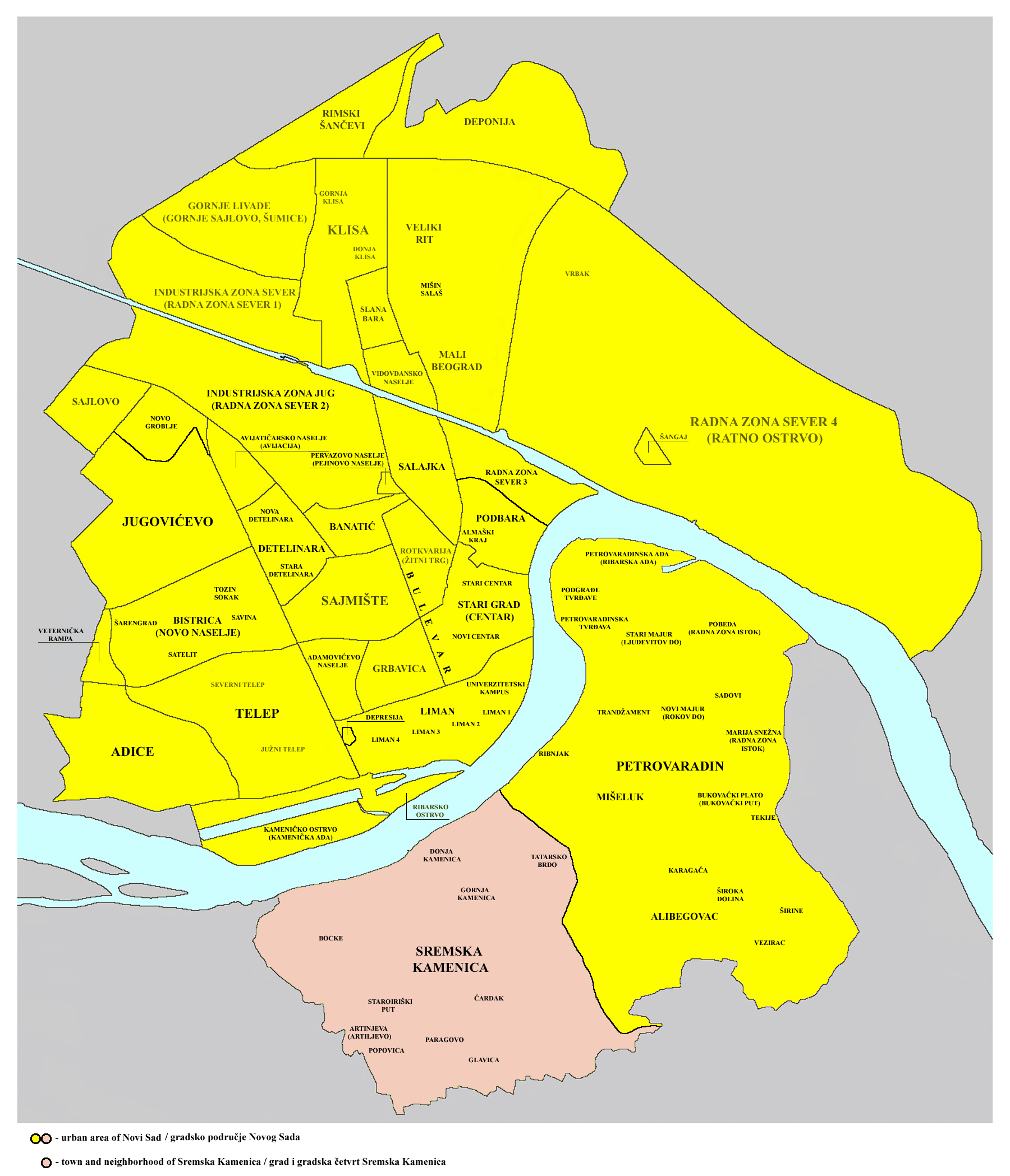 Location map of the town and neighborhood of Sremska Kamenica within urban area of Novi Sad (Vojvodina, Serbia). Mapa položaja grada i gradske četvrti Sremska Kamenica u urbanom području Novog Sada (Vojvodina, Srbija). Situation de la ville de Sremska Kamenica par rapport à Novi Sad (Voïvodine, Serbie).